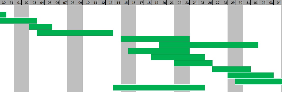 La carta Gantt puede ser fácilmente creada en una planilla Excel.